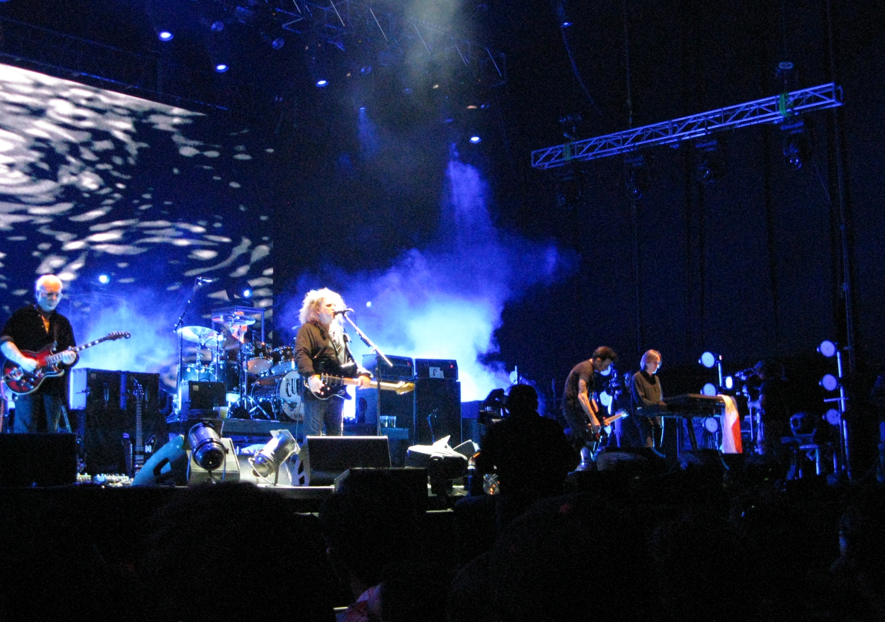 Гурт The Cure на концерті в Сантьяго 14 квітня 2013 року